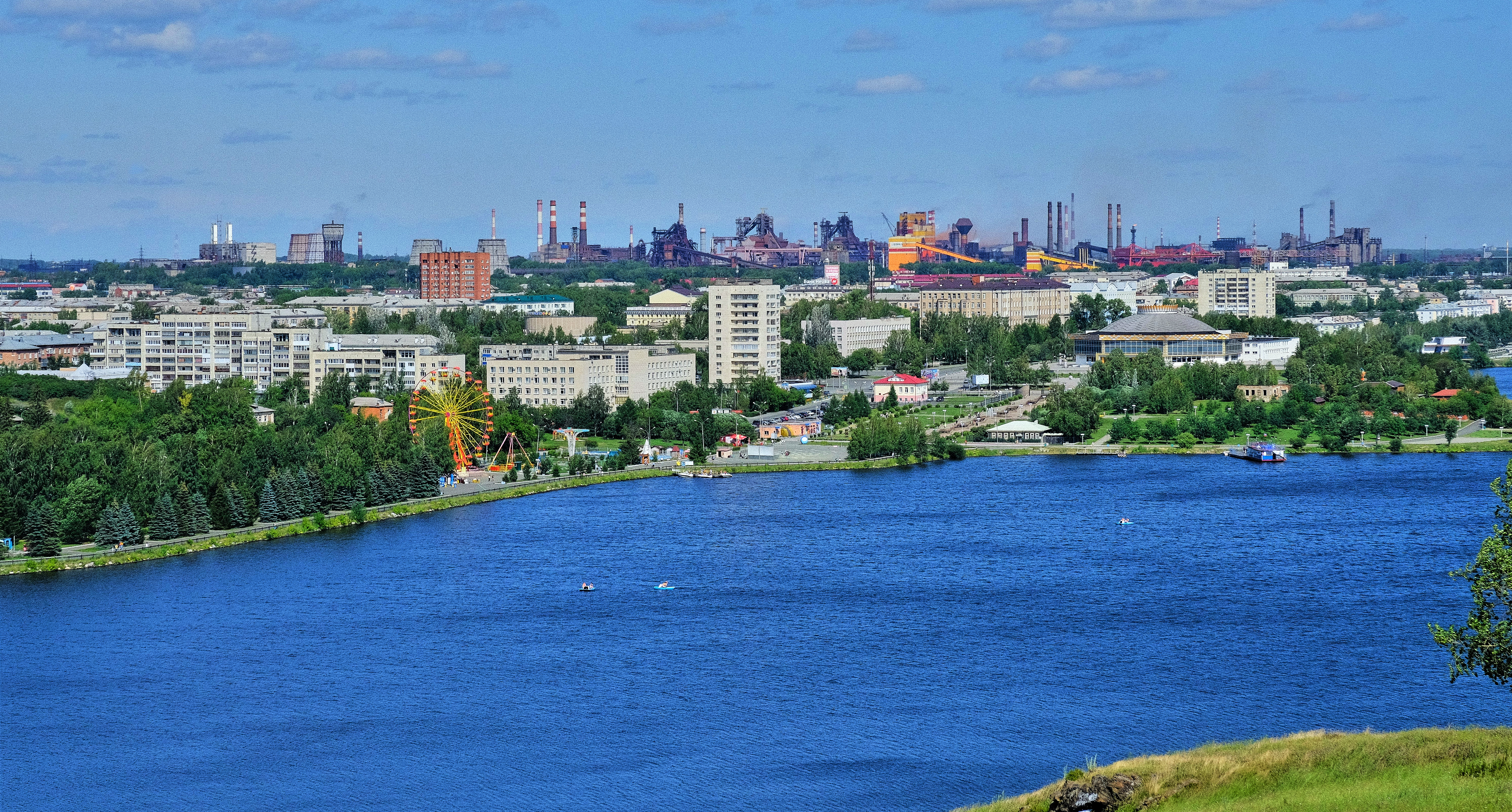 Вид на Нижний Тагил и городской пруд с Лисьей горы. На заднем плане производственная площадка Нижнетагильского металлургического комбината.